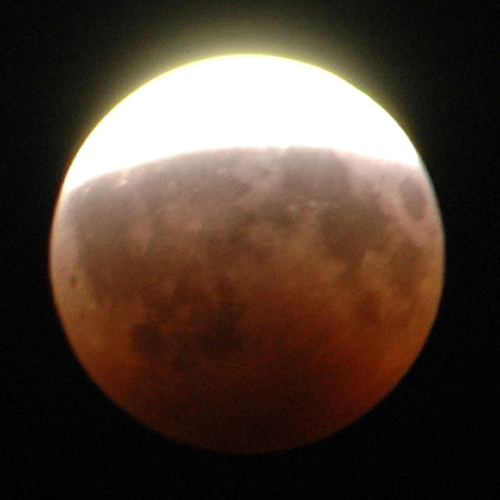 Partielle Mondfinsternis, Trünzig, 16.08.2008, 23:23 Uhr, DSR-Fotografie